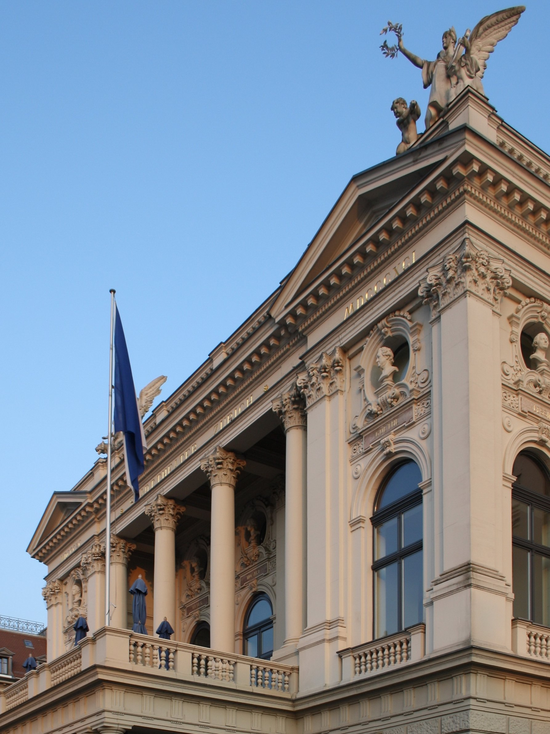 Opera in Zürich (Switzerland)